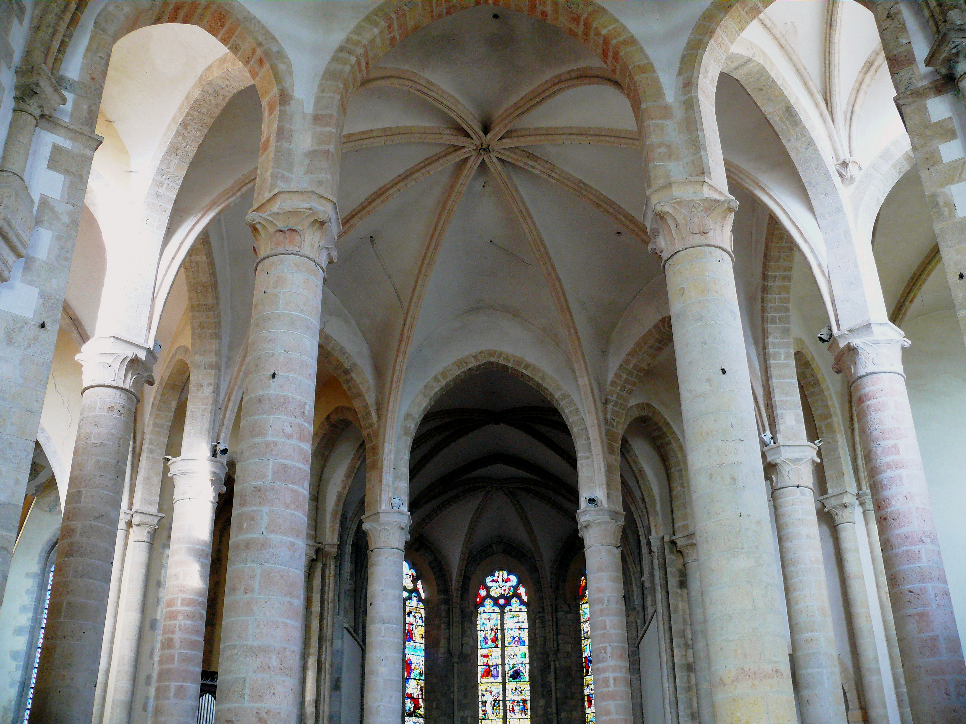 Ferrières - Abbatiale - Choeur